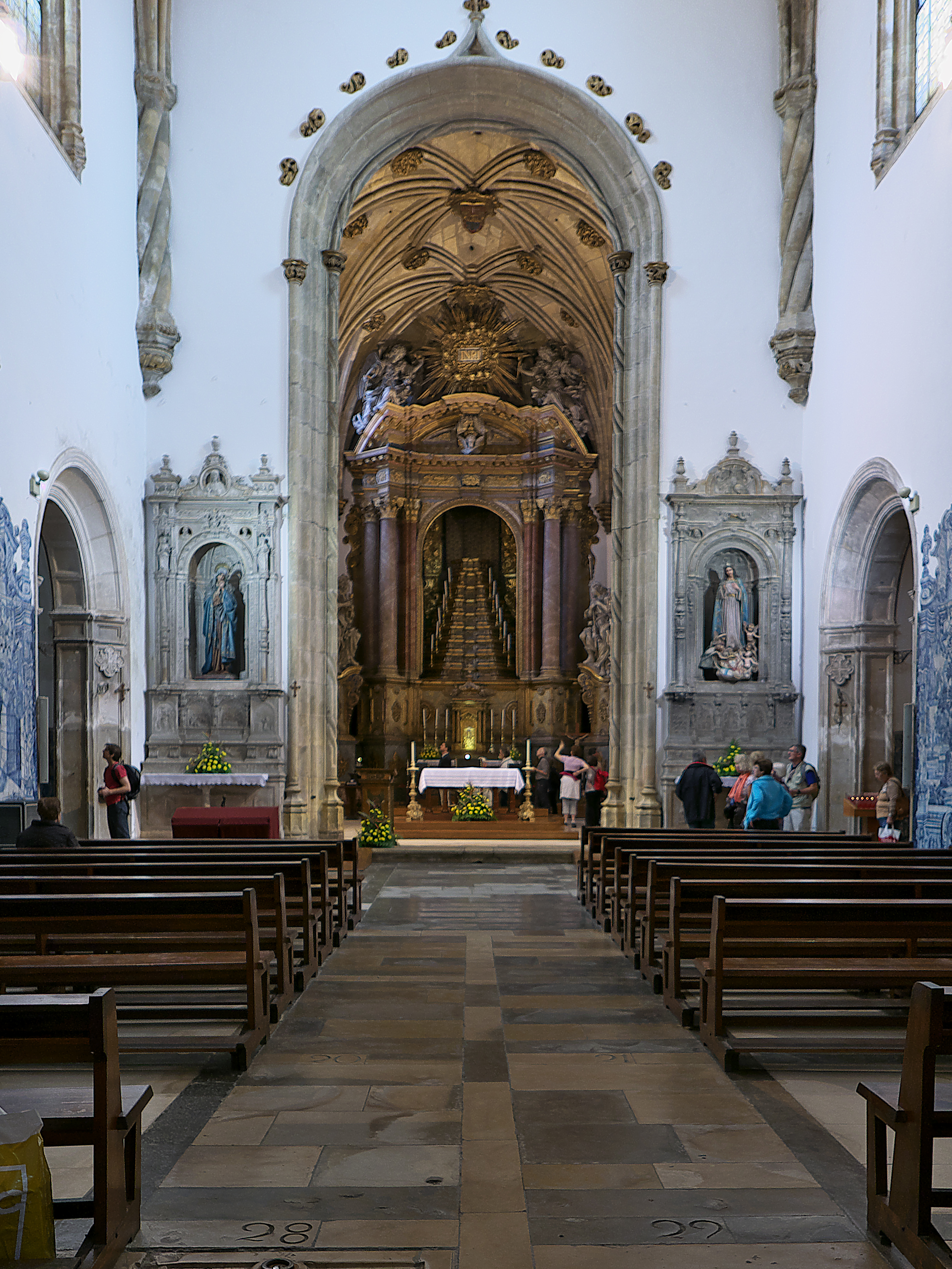 Diogo Boitaca remodela la iglesia monacal (1507-1513)